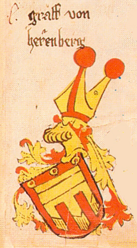 Ingeram-Codex der ehemaligen Bibliothek Cotta graff von herrenberg freigestellt aus